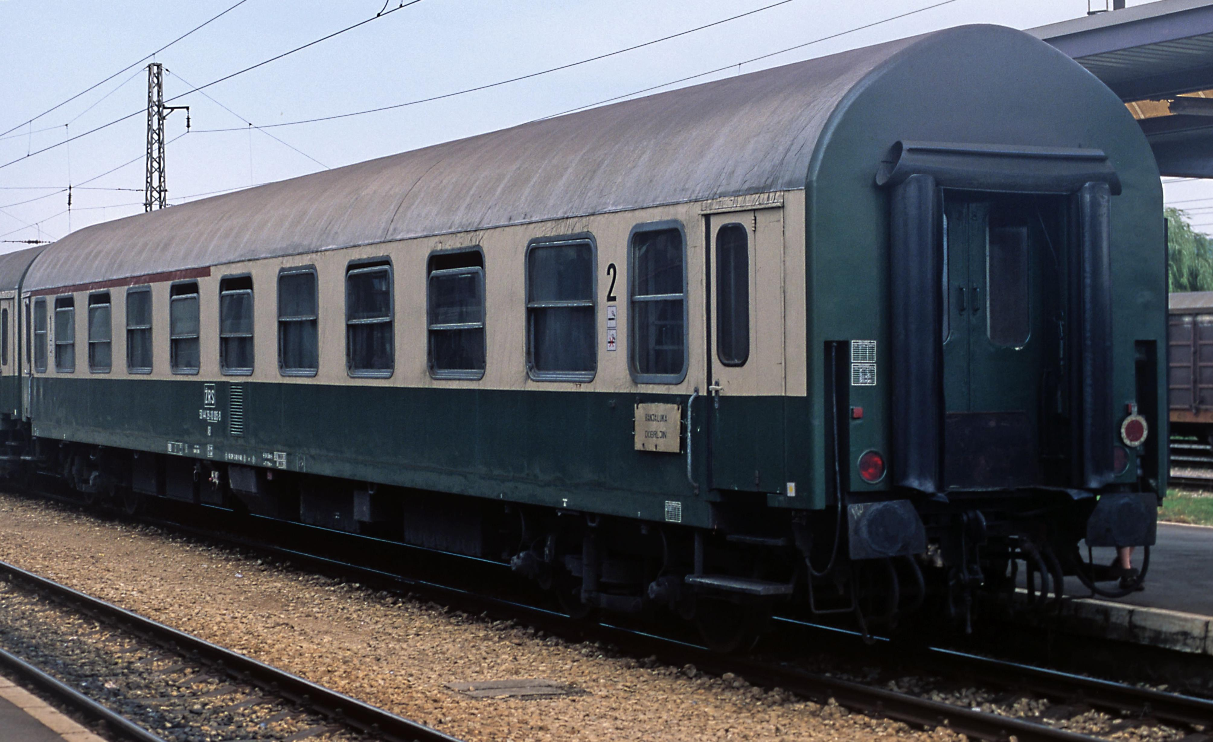 gemischtklassiger Reisezugwagen Typ Y/B70 im äußerlich unveränderten DR-Anstrich chromoxidgrün-elfenbein, als Aufbauhilfe nach den Balkankriegen nach Bosnien abgegeben und bei der Željeznice Republike Srpske eingestellt. Der Wagen läuft auf Drehgestellen der Bauart Görlitz VI mit Klotzbremse, die Einstiege sind noch nicht mit der vierten Trittstufe ausgerüstet. Typisch für die Wagen der Bauart Y/B70 sind die massiven Übergangstüren ohne Öffnungshilfe, deren Flügel nicht gekuppelt sind, aber federbelastet geschlossen gehalten werden, das Lüftergitter auf der Gangseite in Wagenmitte und die wegen Kunststoffzwischenlagen nicht vorhandenen Schmiergefäße für die Gleitstücke zwischen Wiege und Wagenkasten. Im Wagenübergang ist das UIC-Kabel erkennbar. Die Dachform ist wegen der unterflur eingebauten Luftheizung nicht mehr notwendig, sie wurde für ein einheitliches Bild der Züge beibehalten.